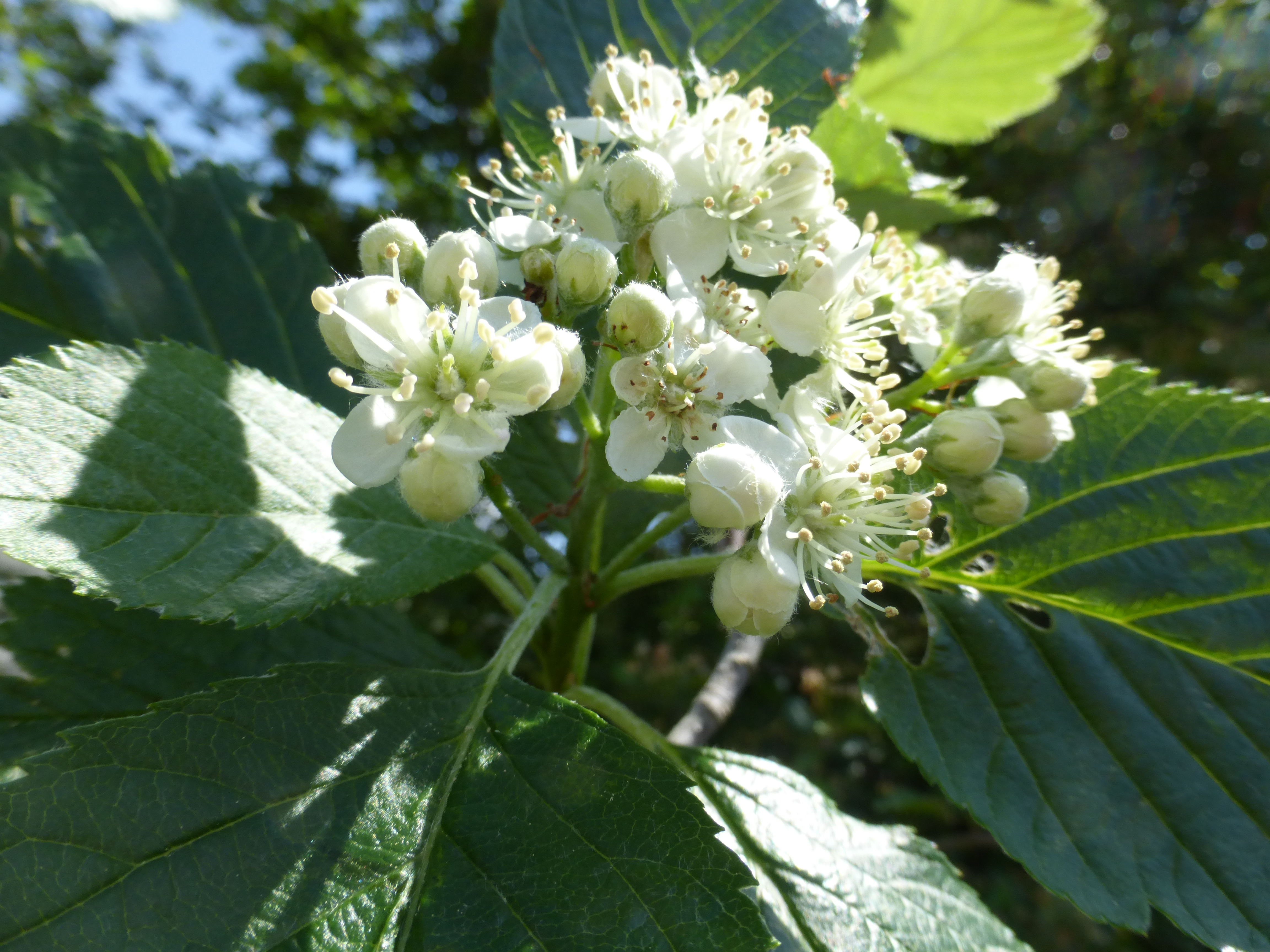 Sorbus lonetalensis Gemeindle, H.-Bissingen ob Lontal Blüten 16.05.2015